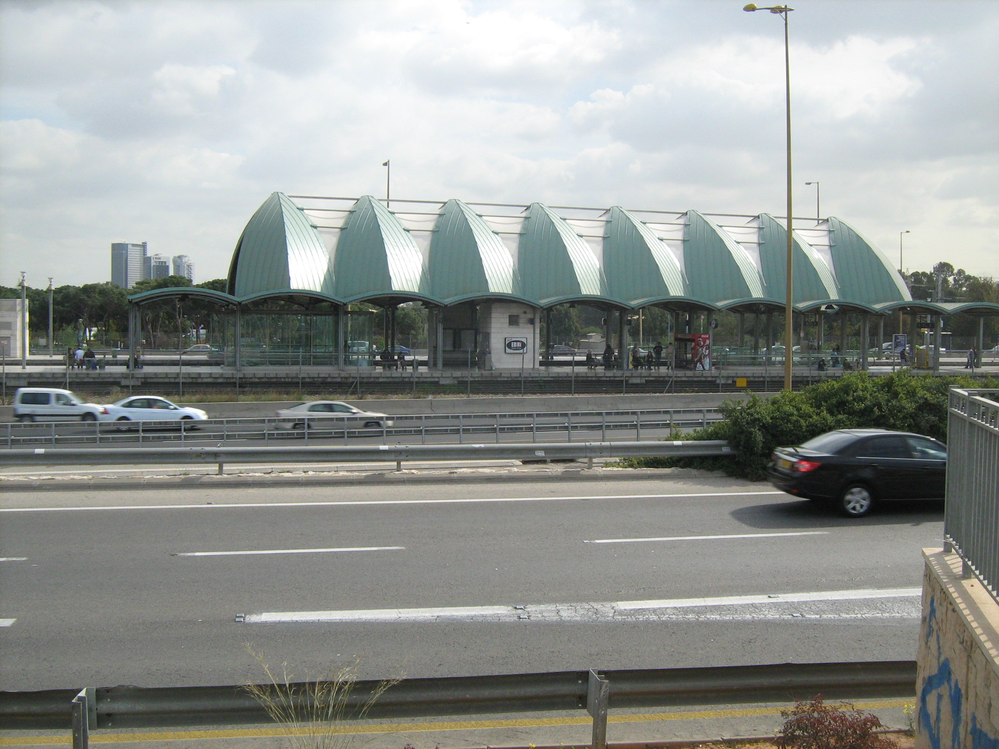 תחנת האוניברסיטה